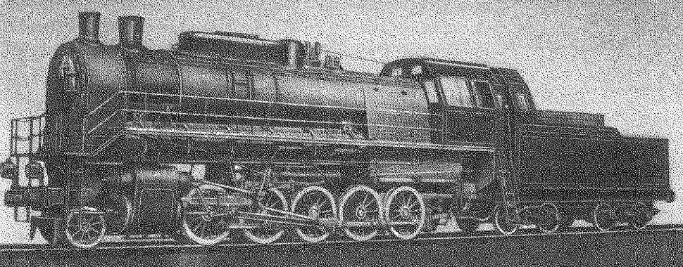 Паровоз Еф/п с пароперегревателем Пирина (переоборудован в 1933 году)